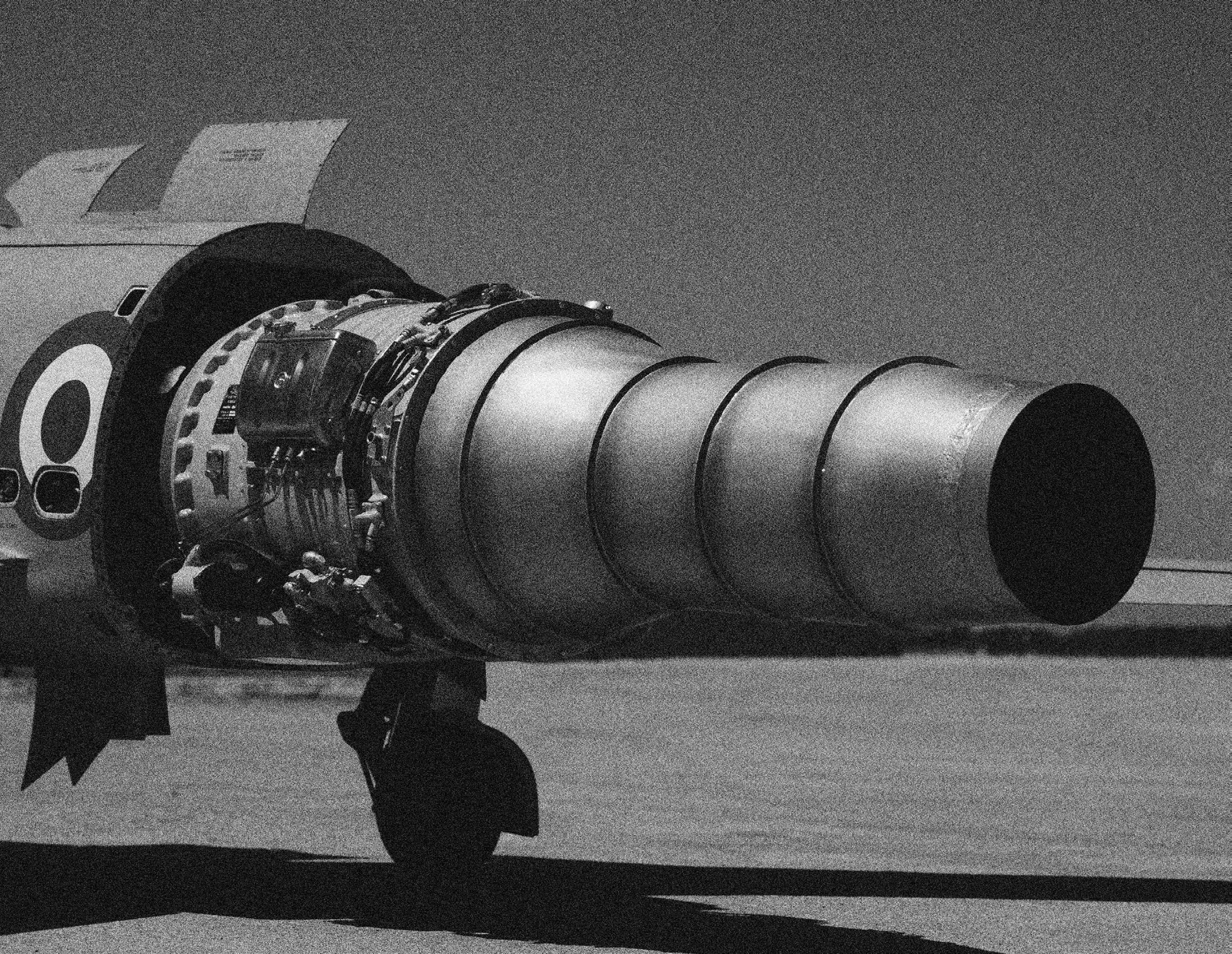 Engine Motore G91R